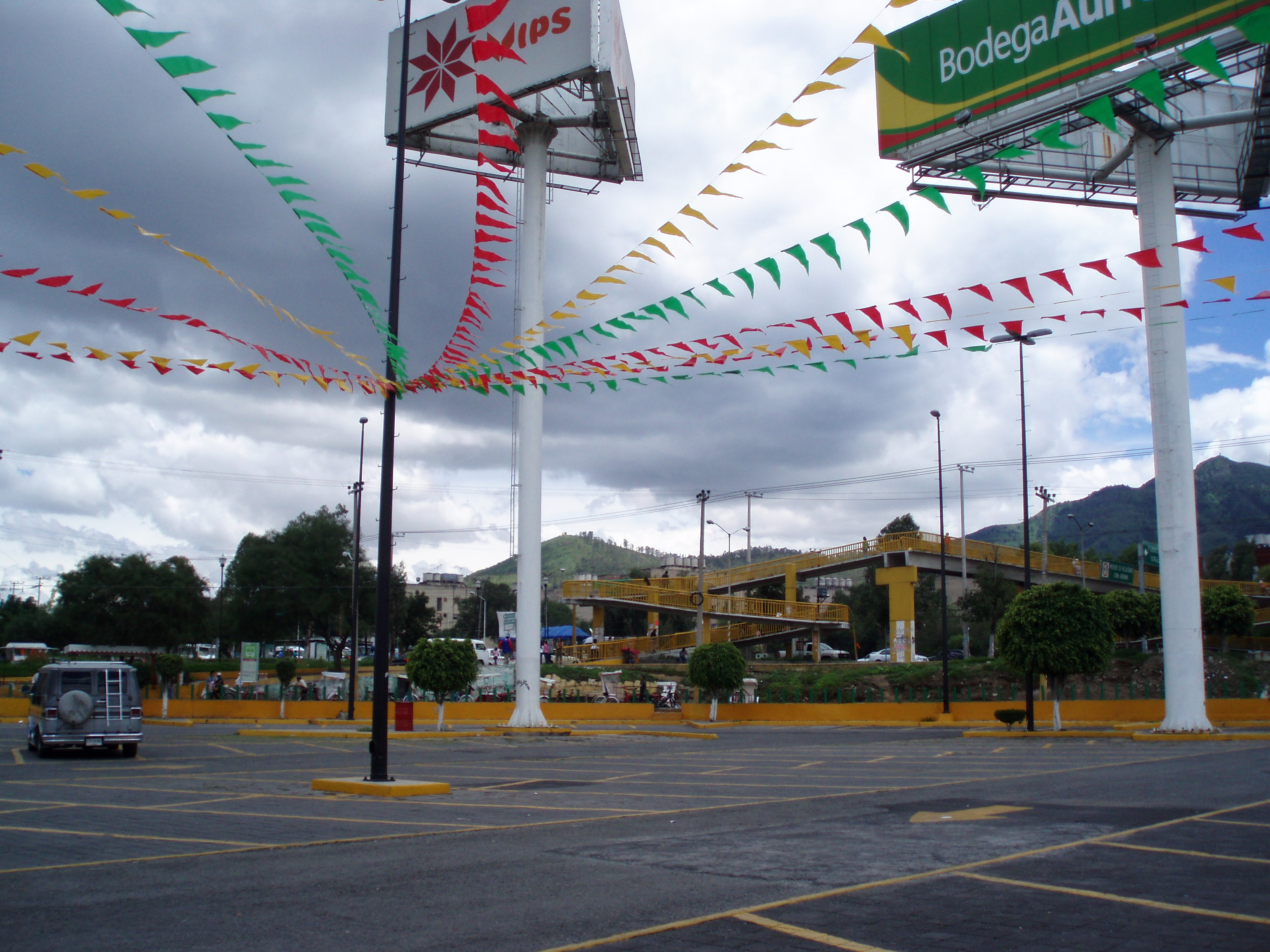 Plaza de Fuentes del valle